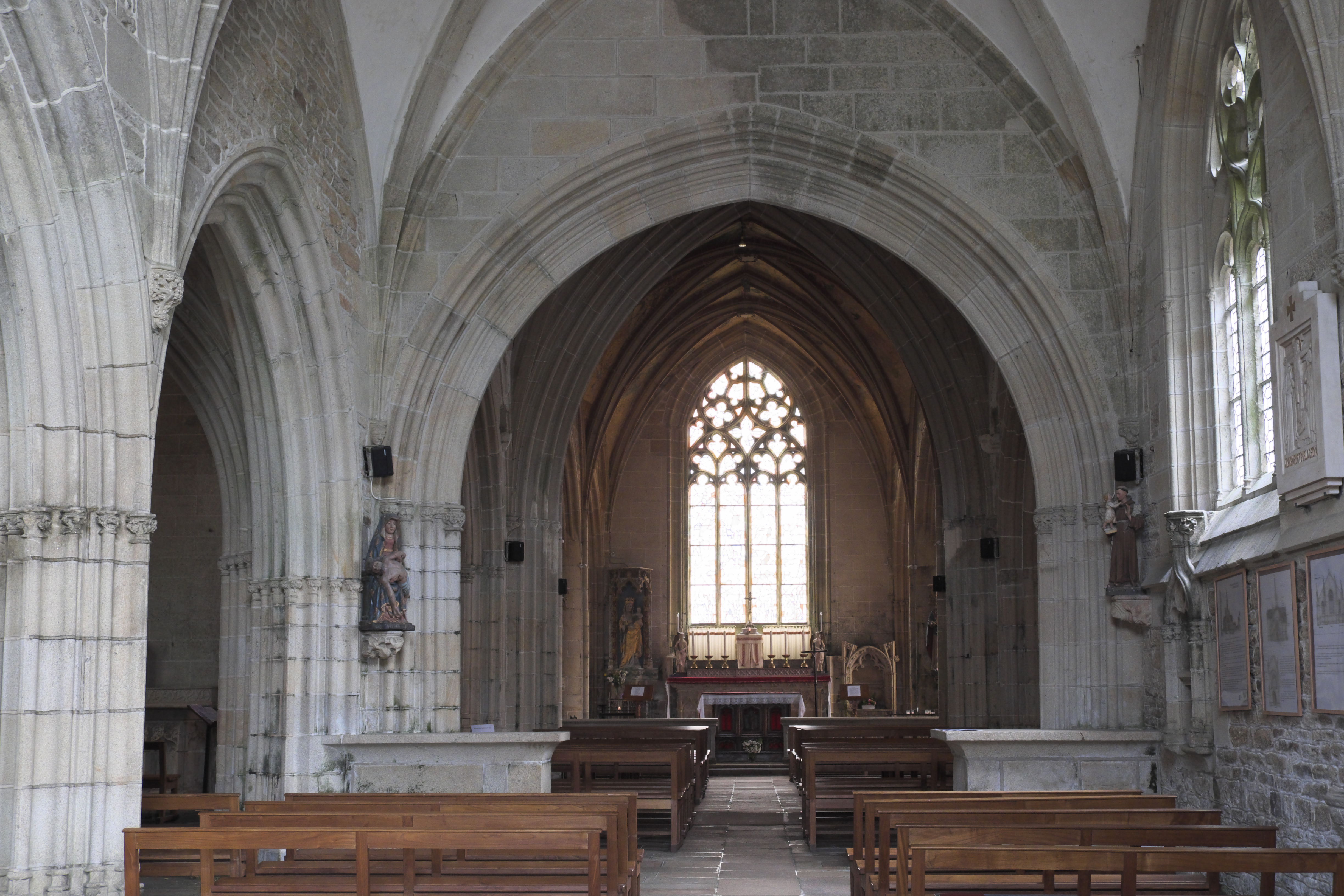 Katholische Kirche Notre-Dame in Kernascléden im Département Morbihan (Region Bretagne/Frankreich), Innenraum